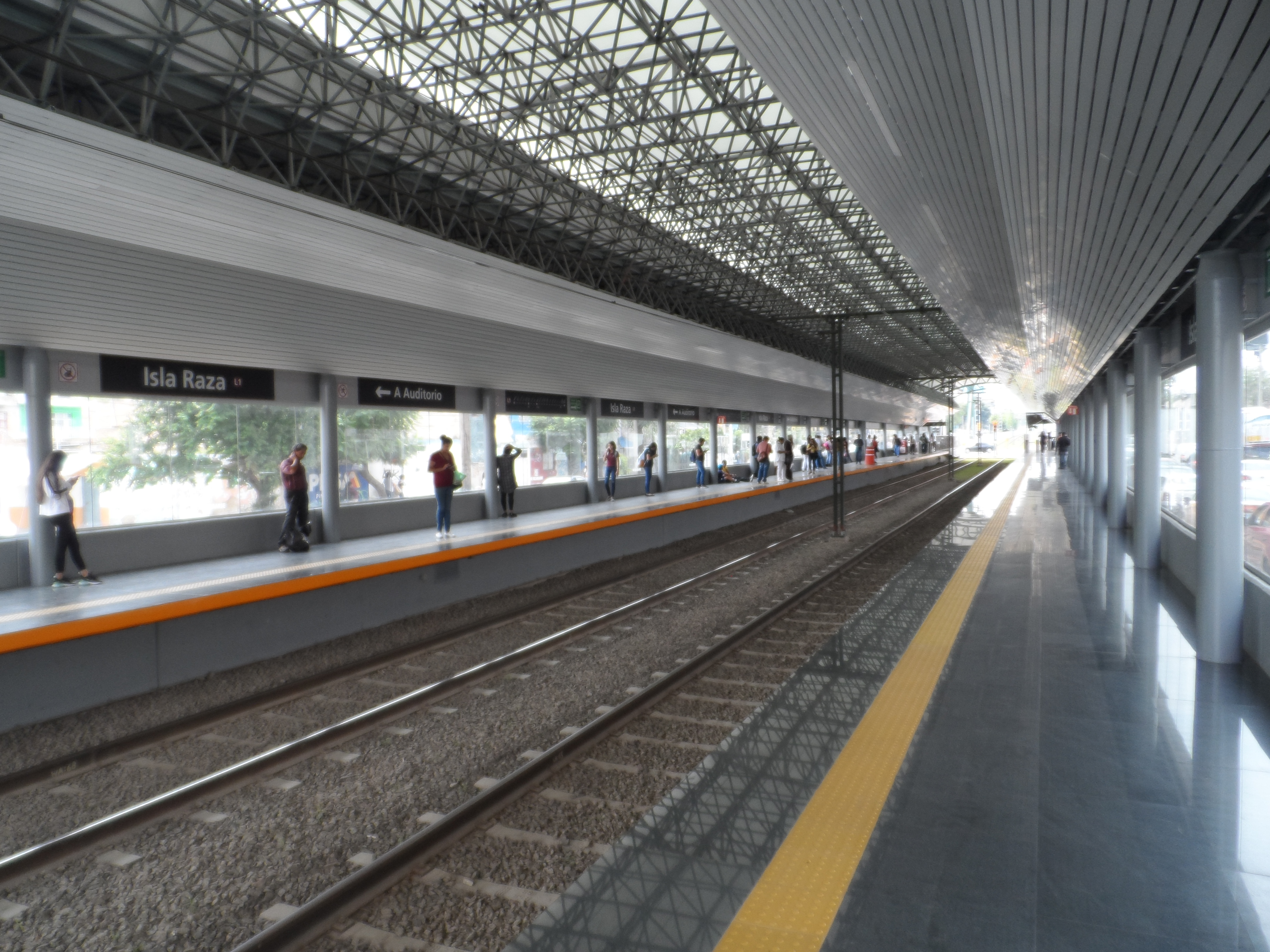 Andenes de la estación "Isla Raza" de la Línea 1 del Tren Ligero de Guadalajara.